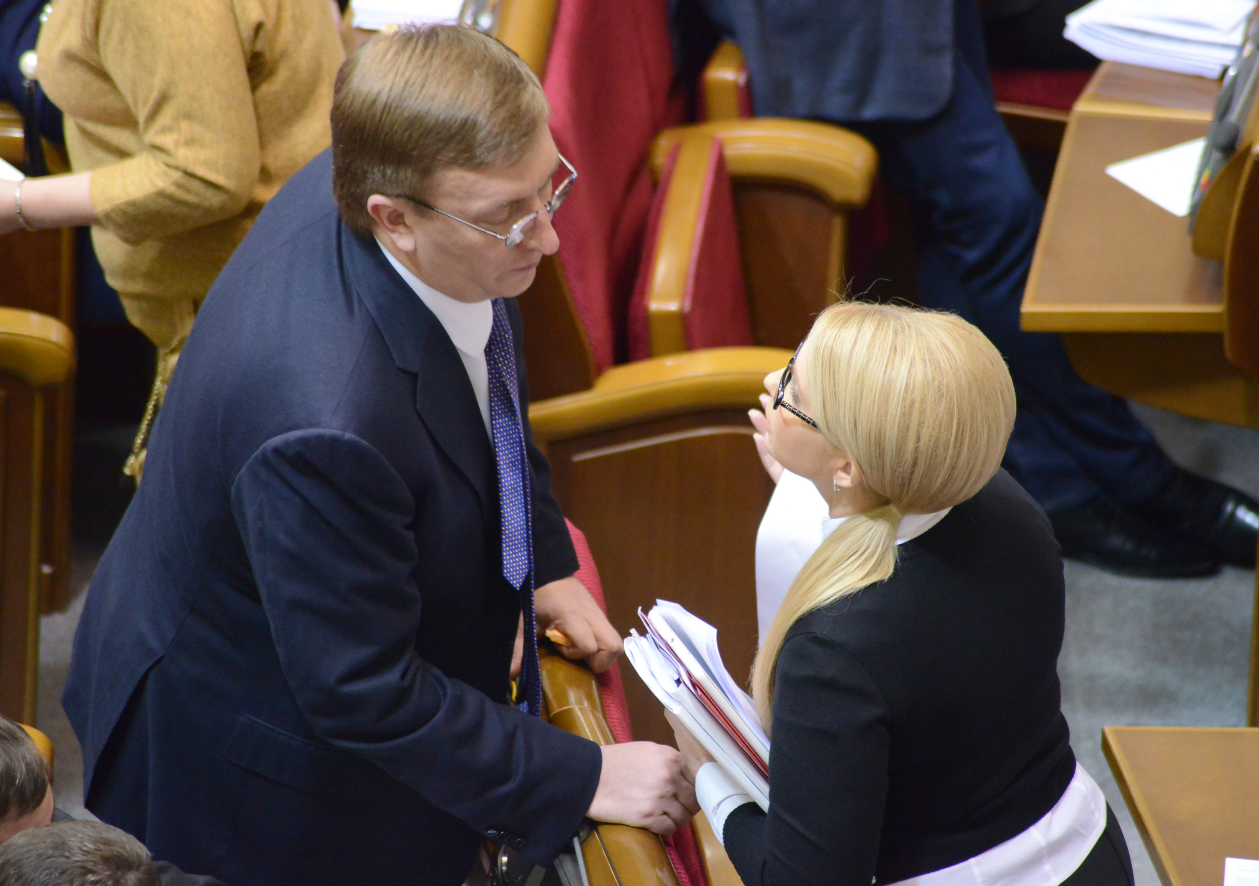 Бухарєв В.В 2016 Тимошенко Ю.В. PARLIAMENT OF UKRAINE